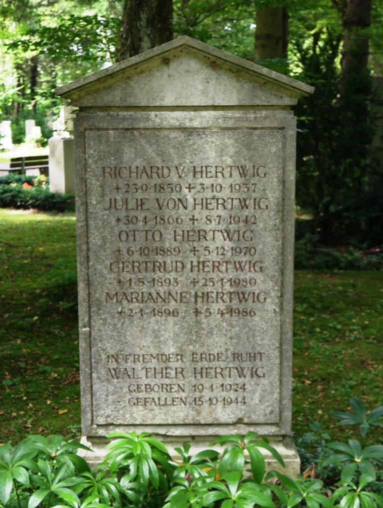 Grab des Zoologen Richard von Hertwig, 1850-1937, auf dem Waldfriedhof in München-Solln